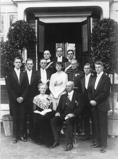 Wersäll Family